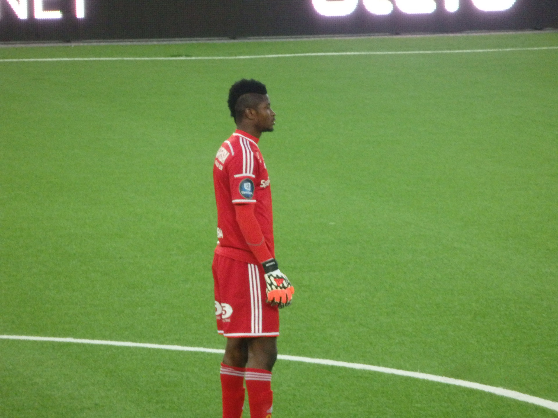 Mande Sayouba for Stabæk mot Start